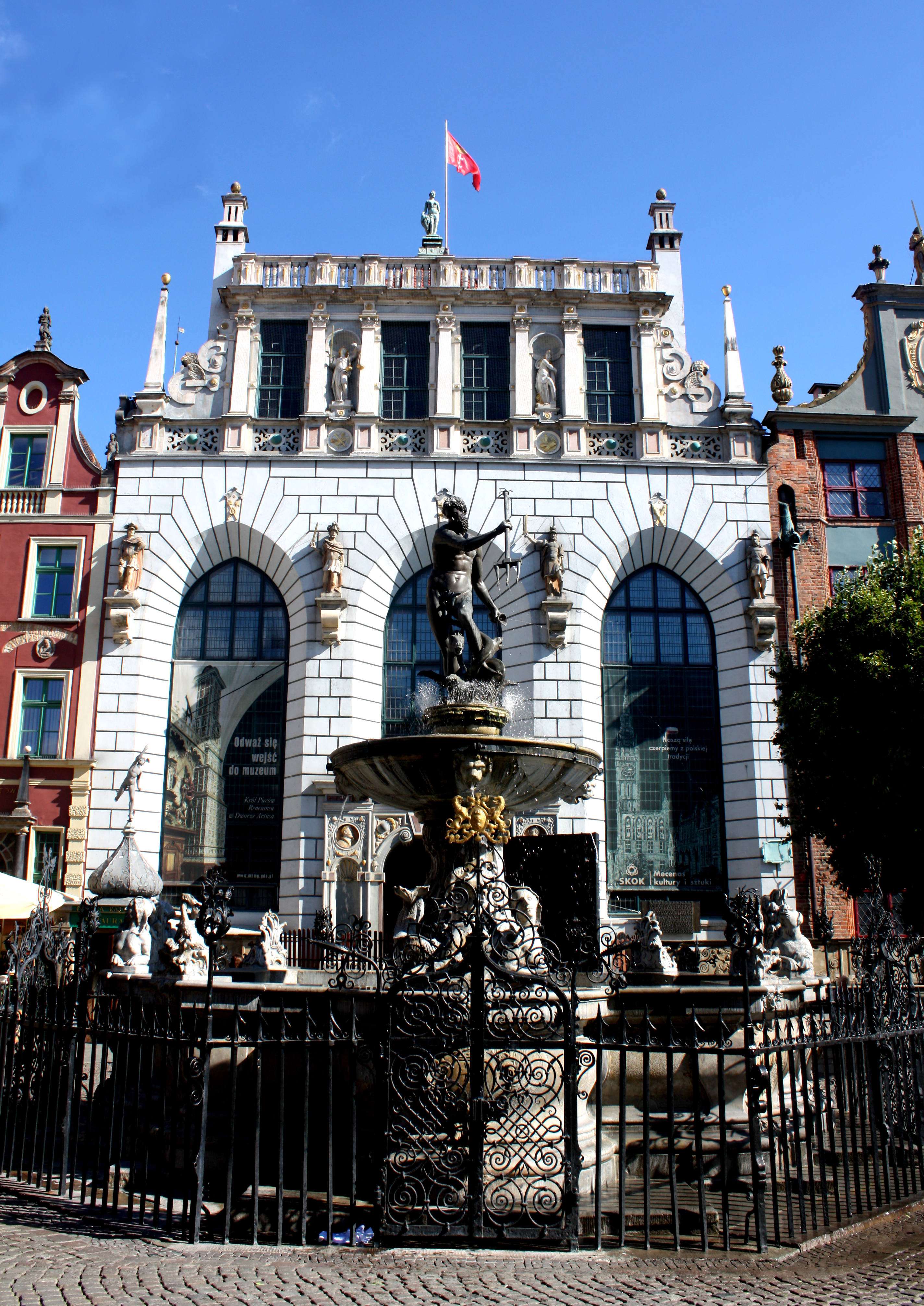 Gdańsk Główne Miasto - Dwór Artusa na Długim Targu